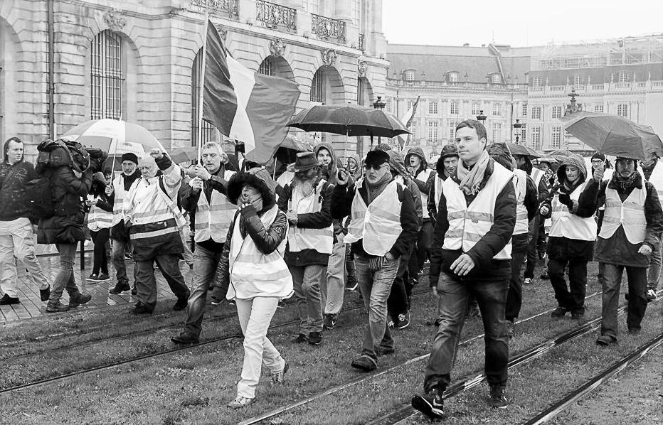 Les Gilets Jaunes